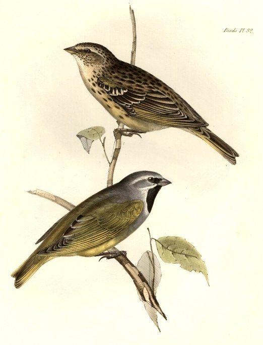 Melanodera melanodera melanodera (Original description: Chlorospiza melanodera)